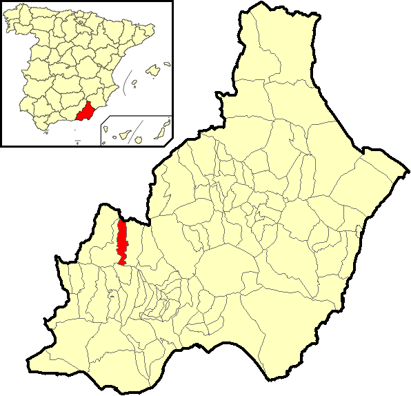 Situación del término municipal de Abla respecto a la provincia de Almería, en España.